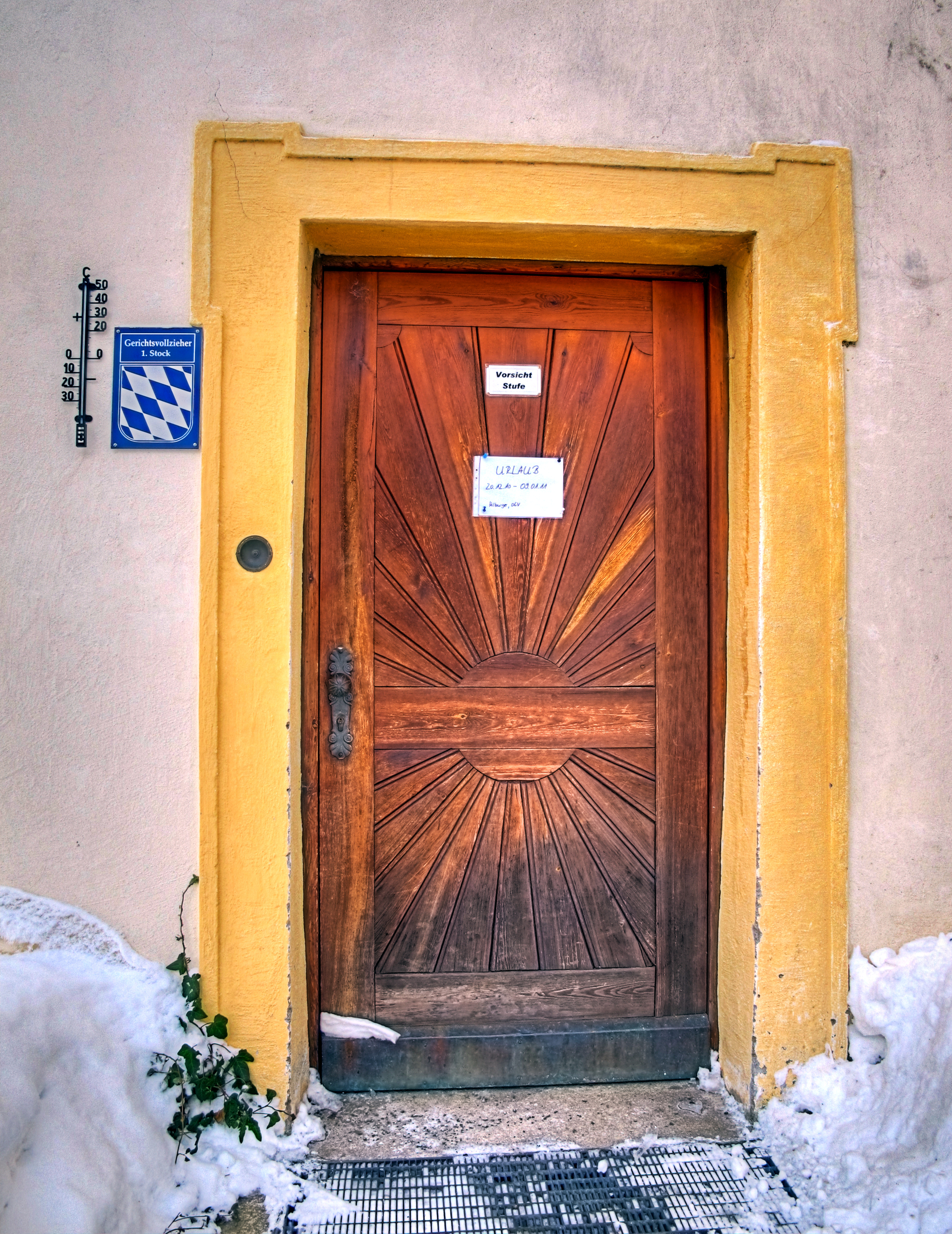 Sitz des Gerichtsvollziehers des Amtsgerichts von Tirschenreuth